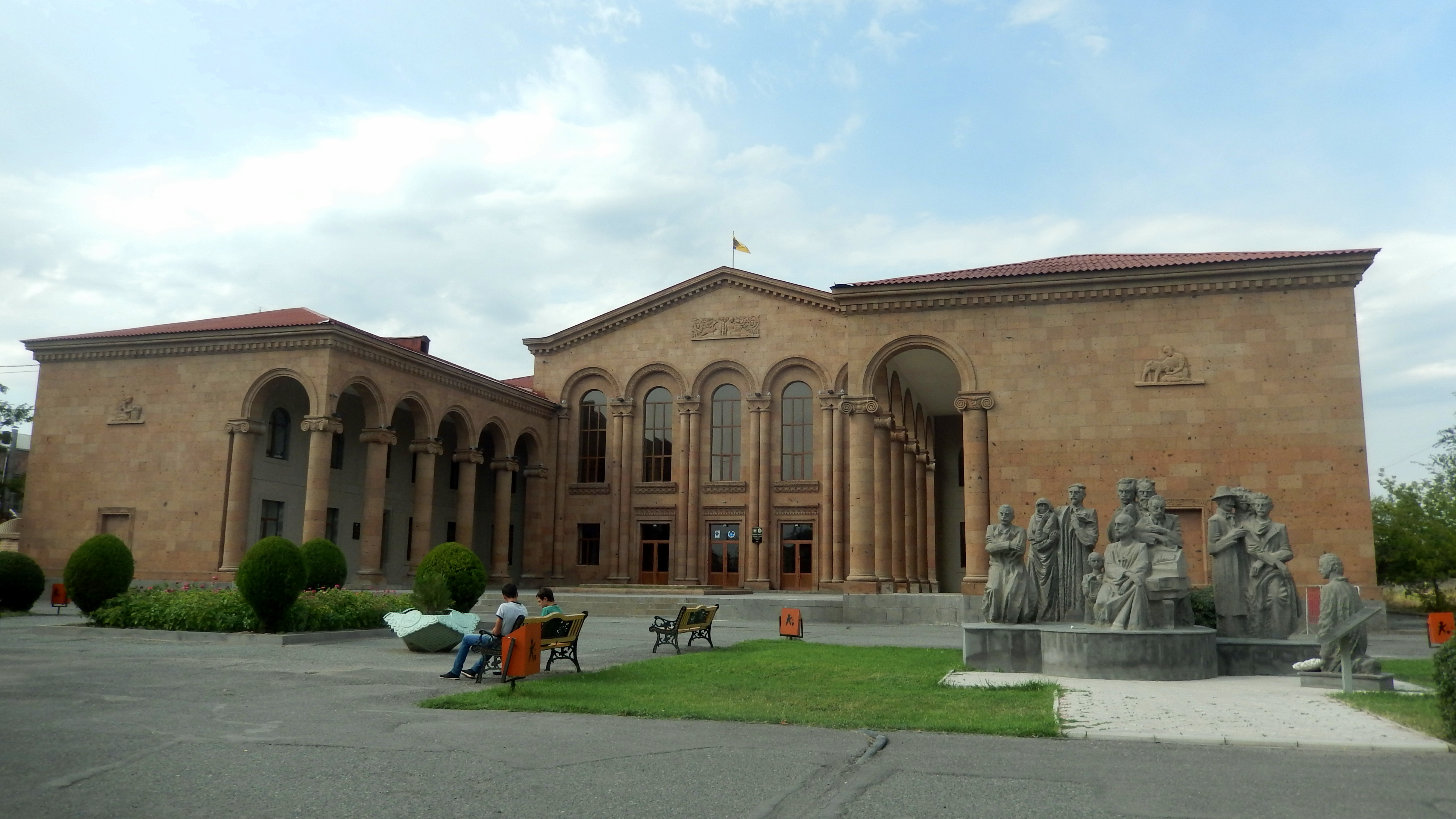 Մշակույթի տուն, Վաղարշապատ 2/29